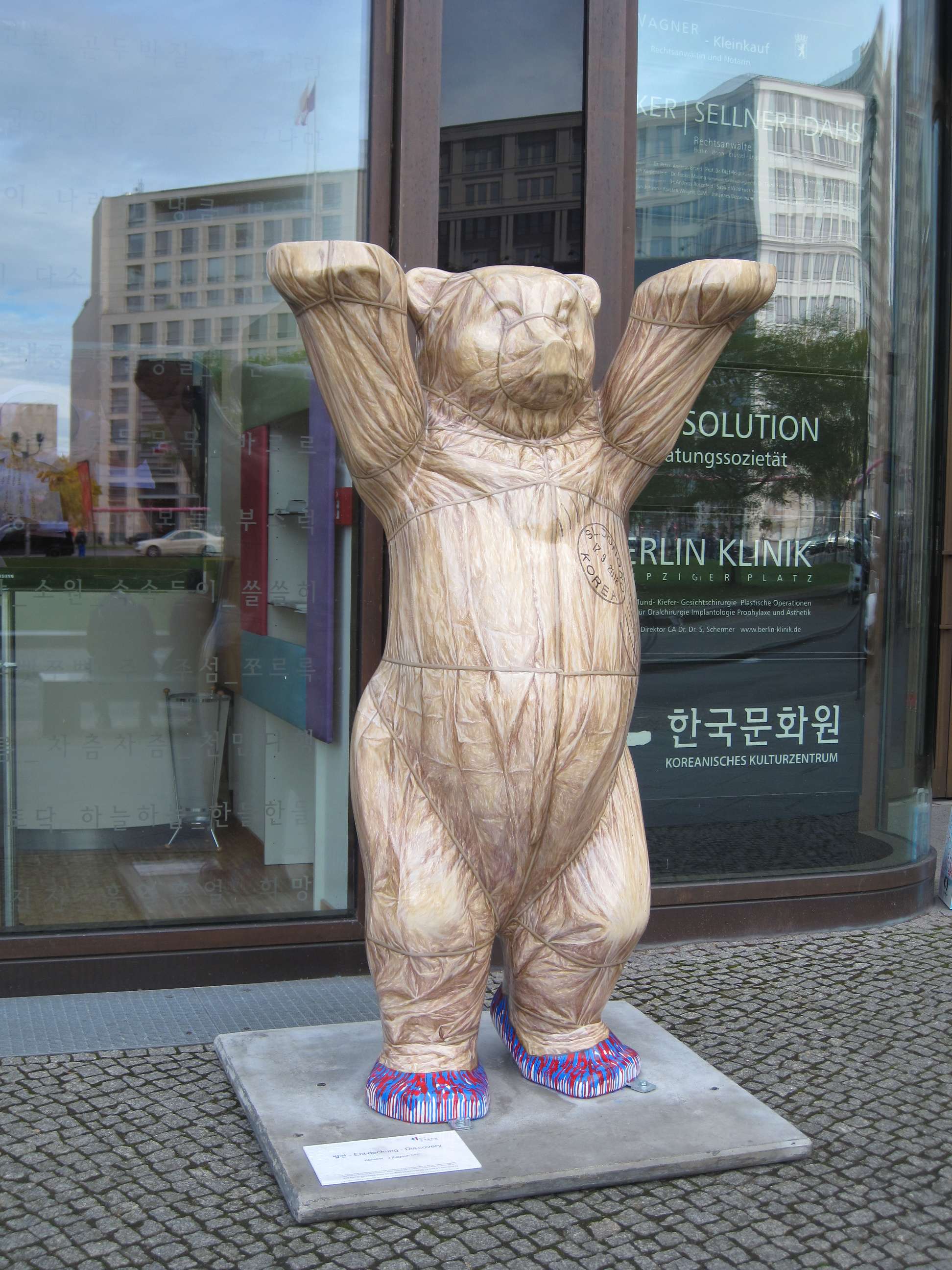 Buddy Bär „발견 (Balgyeon) – Ent▪deckung – Dis▪covery“ in Berlin, Leipziger Platz 3 vor dem Koreanischen Kulturzentrum. Informationstafel: 발견 – Ent▪deckung – Dis▪covery Künstler: Junggeun OH In der Hoffnung auf die unveränderliche Freundschaft zwischen Korea und Deutschland steht der Bär, das Symbol der deutschen Hauptstadt und die Wurzel des Koreanischen Volkes, heute vor dem Koreanischen Kulturzentrum. September 2012.